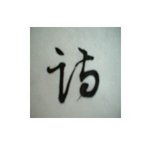 Stile sosho